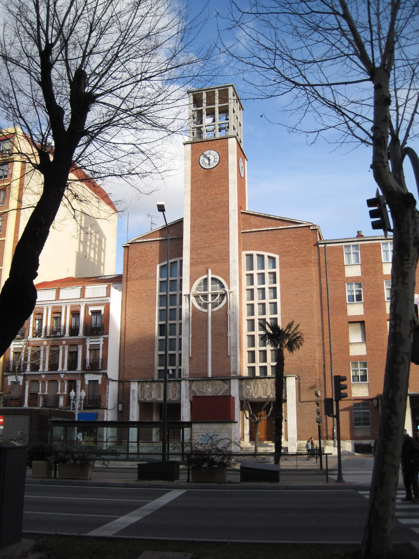 Fachada de la iglesia parroquial de la Inmaculada Concepción, Valladolid (España).